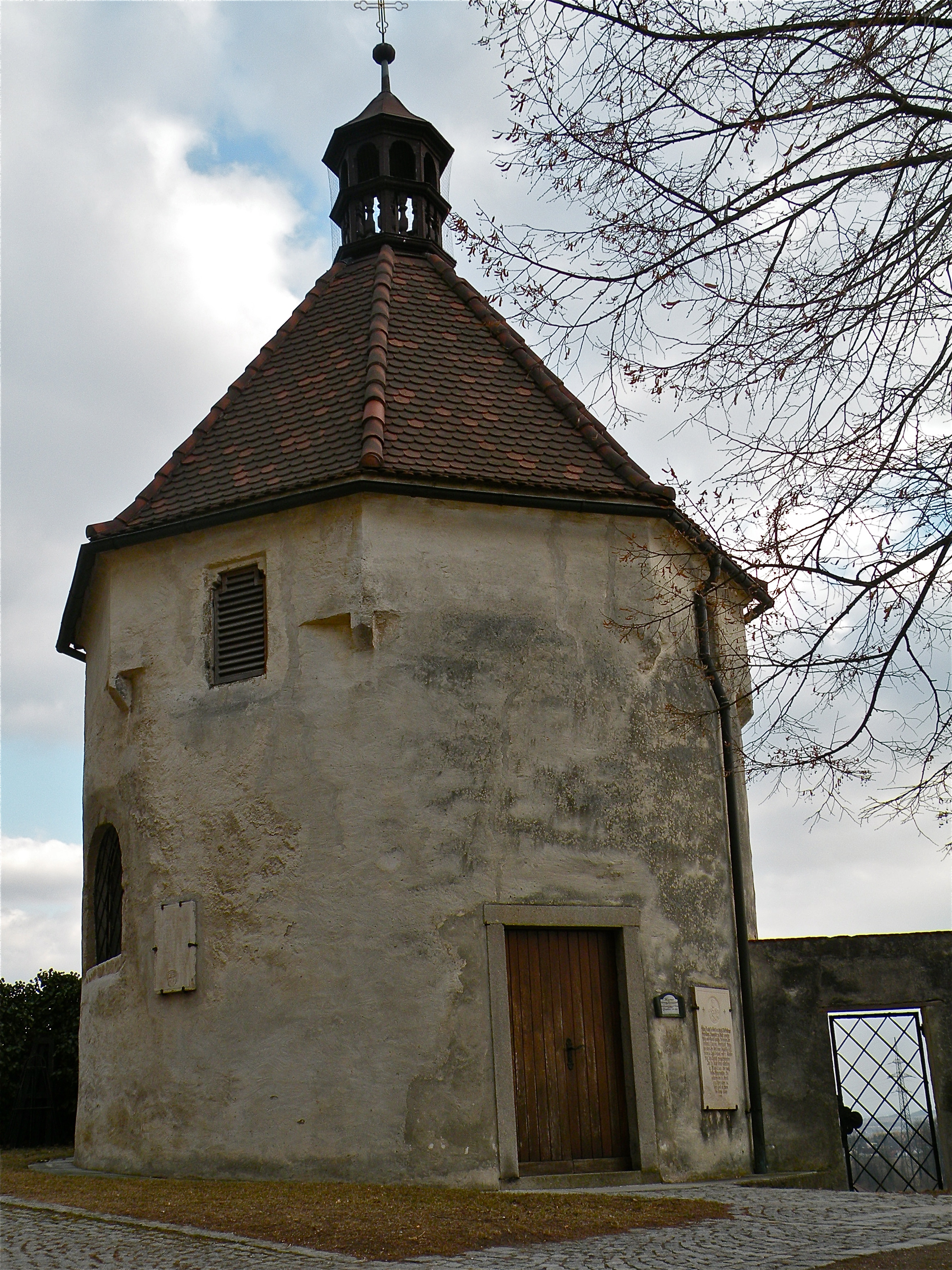 Karner